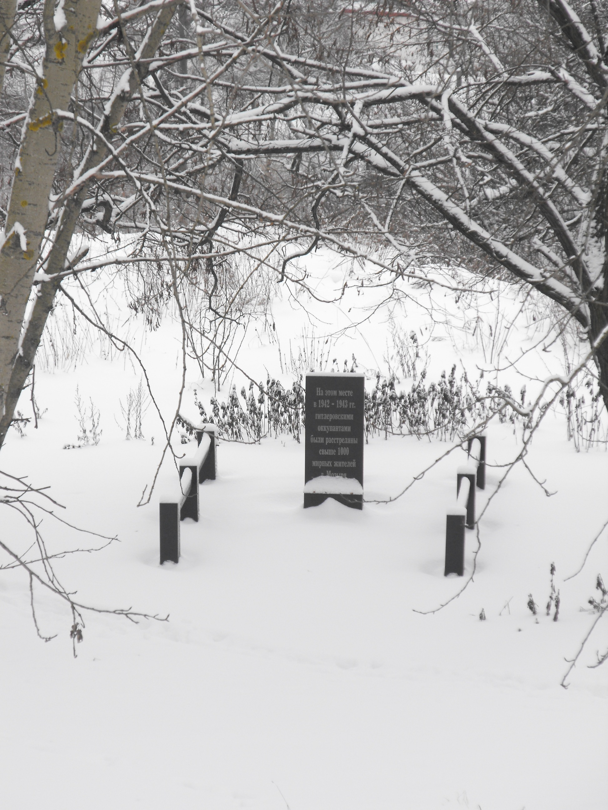 Памятник на одном из мест массовых убийств нацистами мозырьских евреев (по другую сторону дороги от Кургана славы).